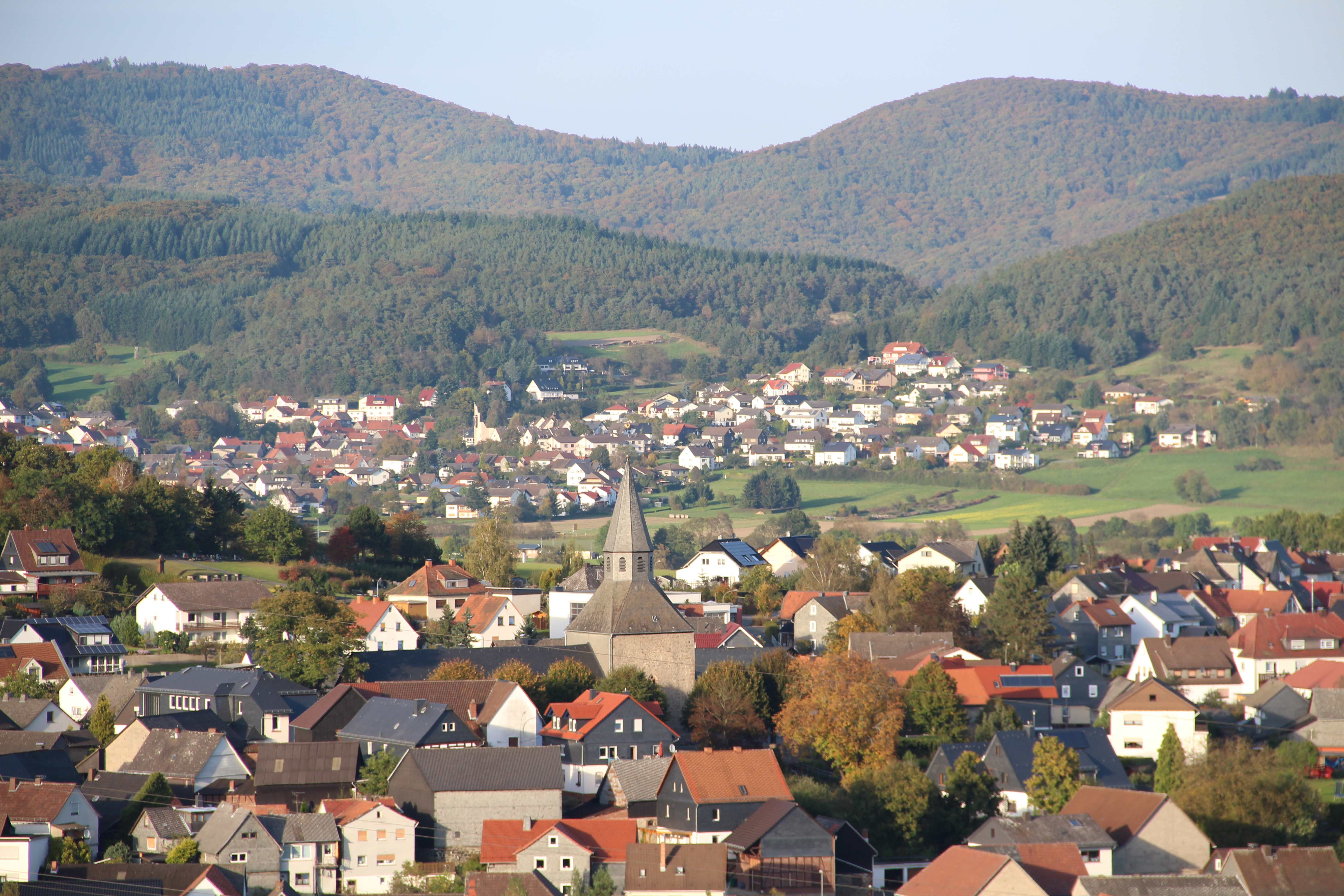 Im Vordergrund der Ort Dautphe mit der Martinskirche - dahinter der Ort Kombach